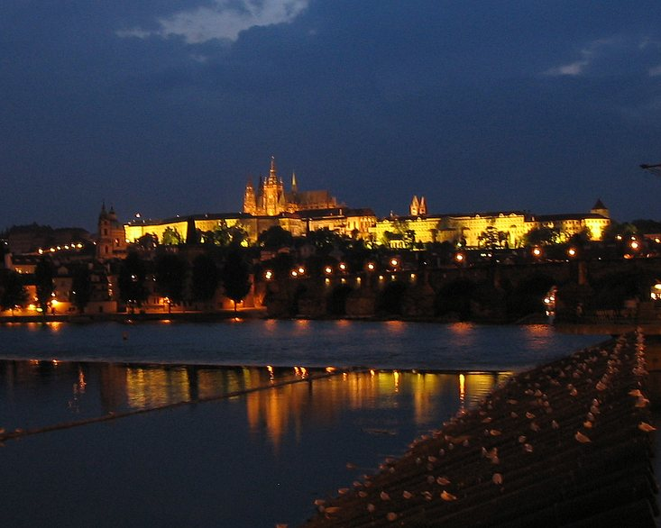 widok na praski zamek i Most karola autor: Mohylek